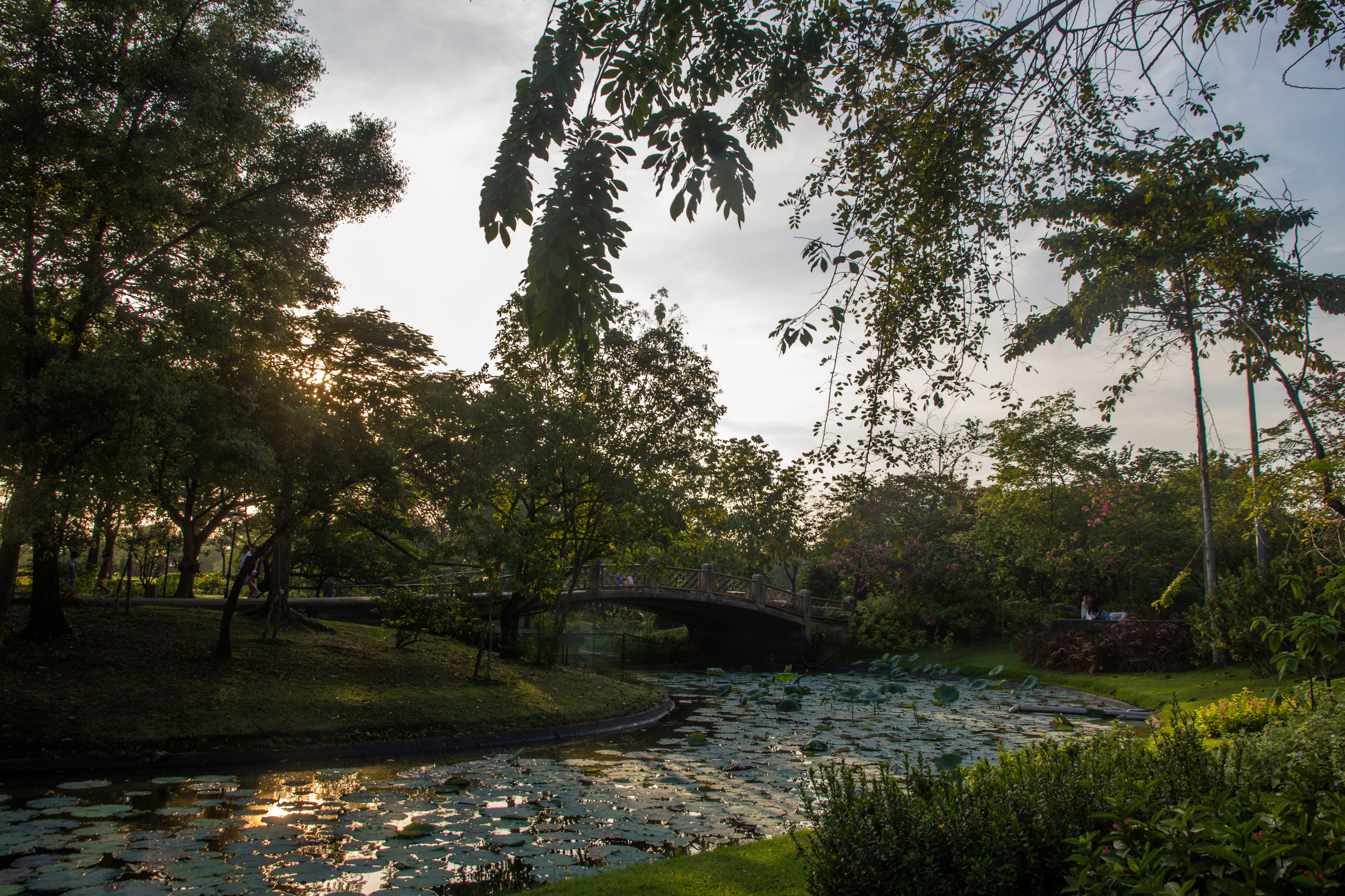 Queen Sirikit Park